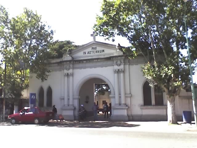 Municipal Cementery, Merlo Partido, Buenos Aires Province.